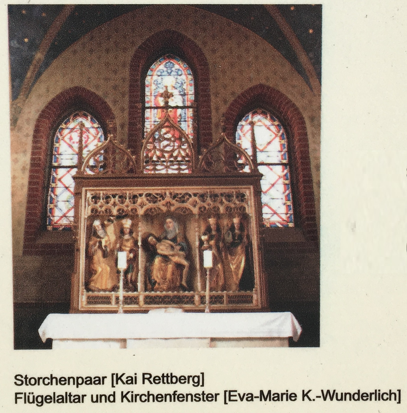 Die neugotische Dorfkirche in Niebel (Stadt Treuenbrietzen) entstand im Jahr 1895. Im Innern befindet sich unter anderem ein gotischer Schnitzaltar aus dem Ende des 15. Jahrhunderts. Er zeigt eine Vespergruppe. Aufnahme von einer öffentlich zugänglichen Informationstafel südlich der Kirche.